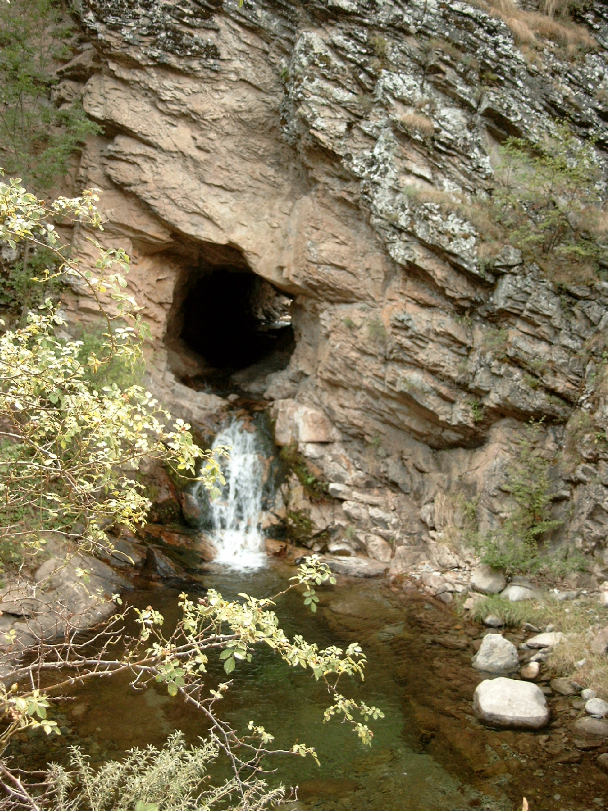 Река Соволянска Бистрица в Осогово